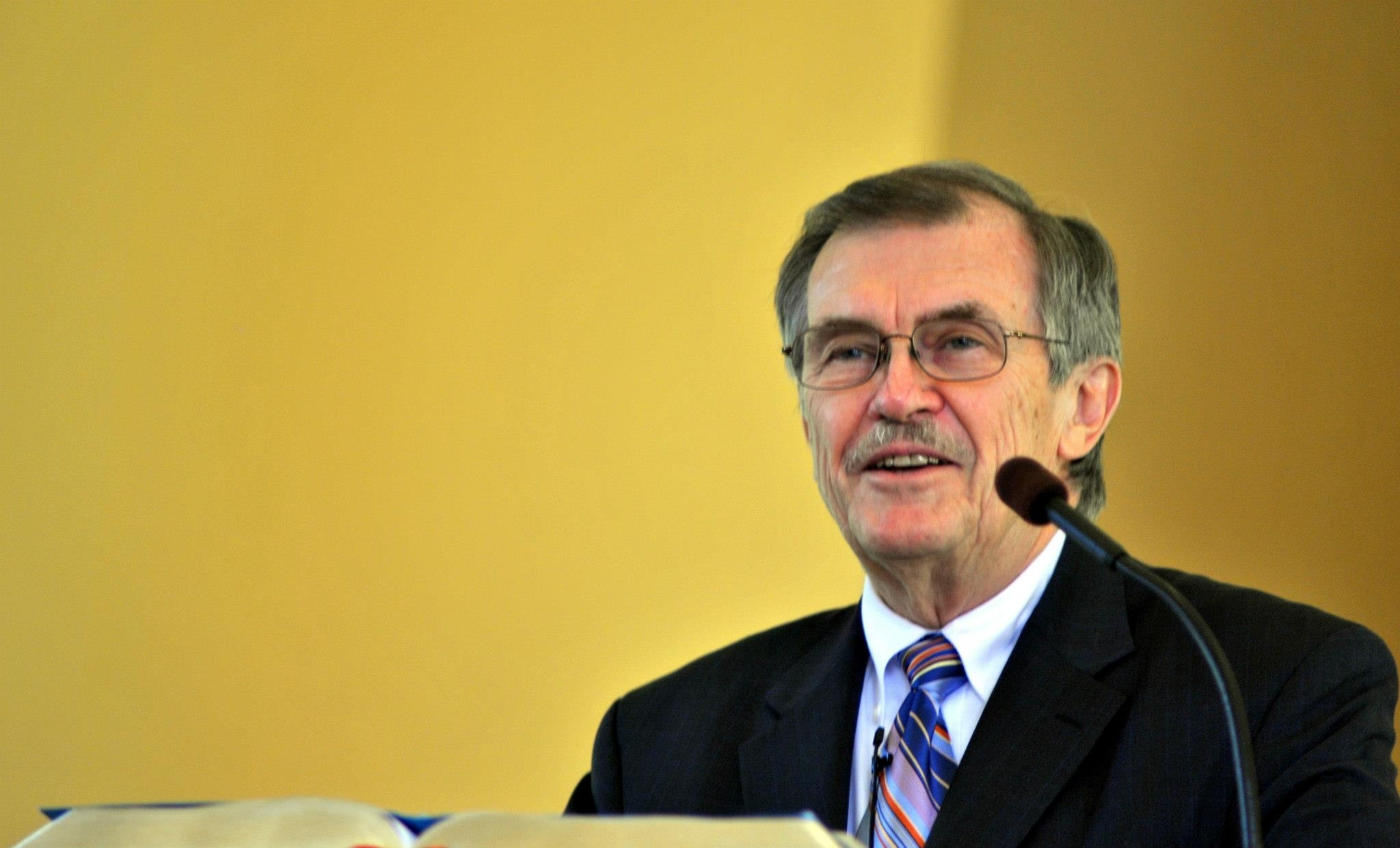 Darell Guder predigt in der Miller Chapel (Princeton Seminary)